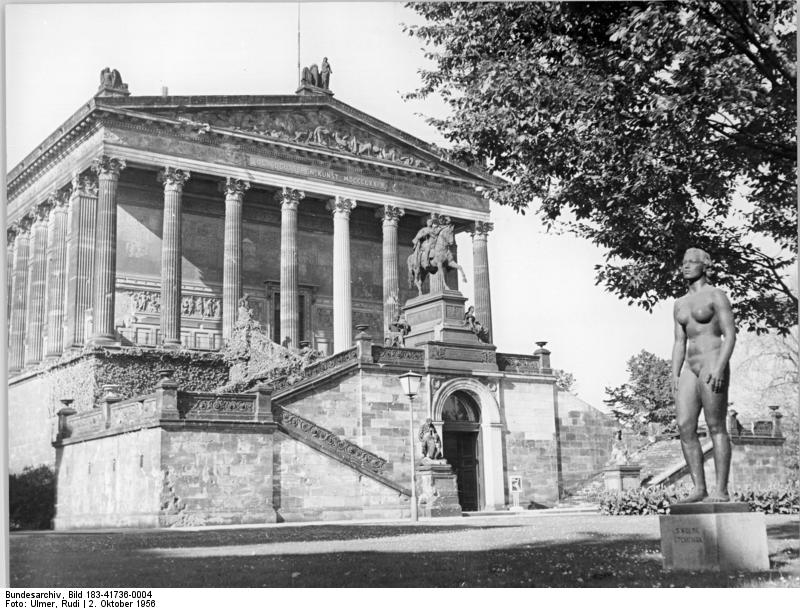 Berlin, Nationalgalerie, Statue ADN-ZB Ulmer Wjt-Schm 2.10.1956 Berlin UBz: National-Galerie in der Bodestraße.